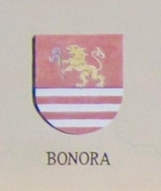 Cognomi storici dei Vicini che discendono dalle famiglie della Regola che abitavano a Predazzo e riguardano 19 cognomi: Boninsegna, Bonora, Bosin, Brigadoi, Defrancesco, Degaudenz, Dellagiacoma, Dellantonio, Dellasega, Demartin, Dezulian, Felicetti, Gabrielli, Giacomelli, Guadagnini, Morandini, Nicolao, Piazzi e Zanna.